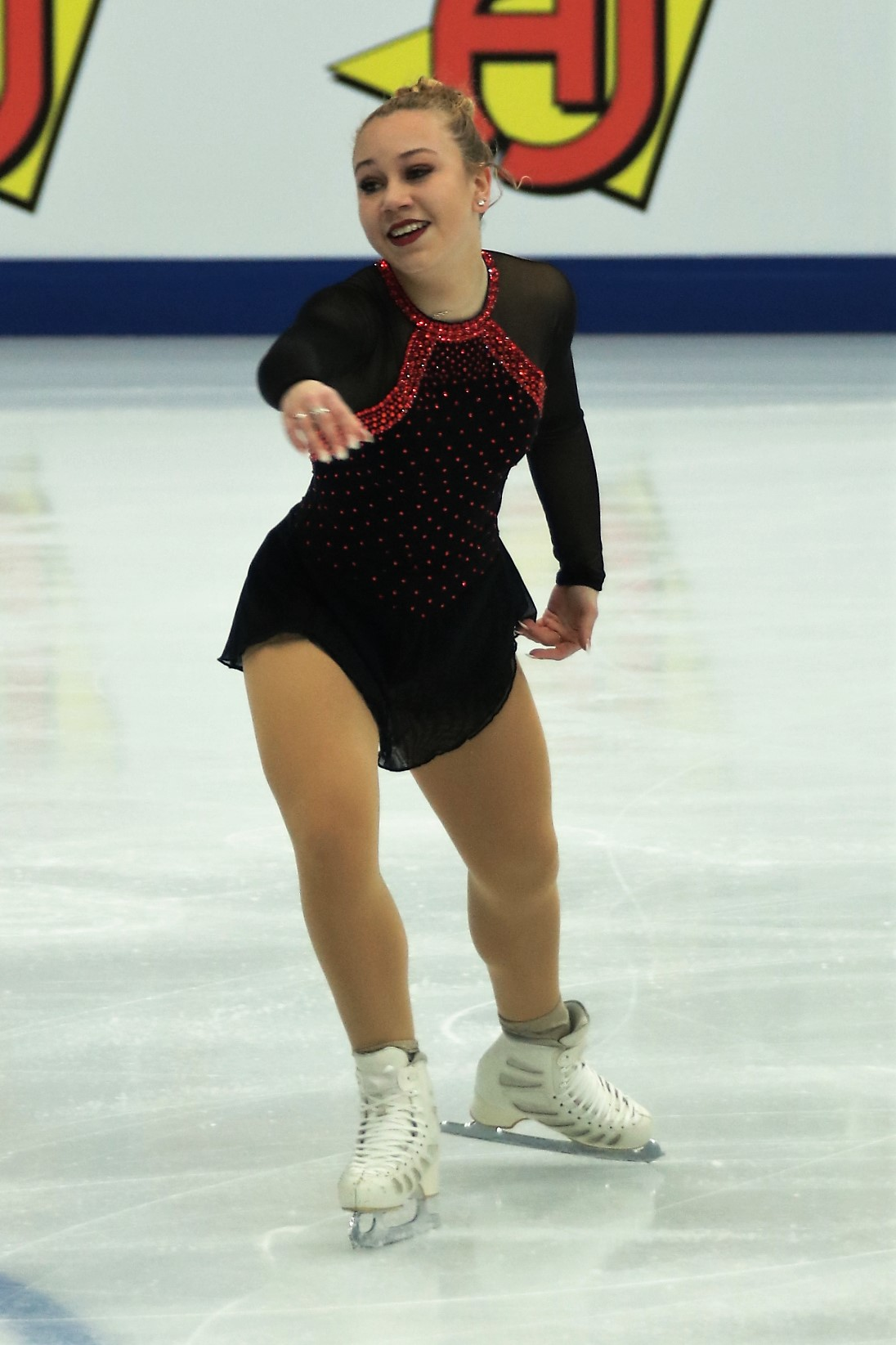 Кьярха ван Тиль (Нидерланды) на Чемпионате Европы по фигурному катанию 2018.